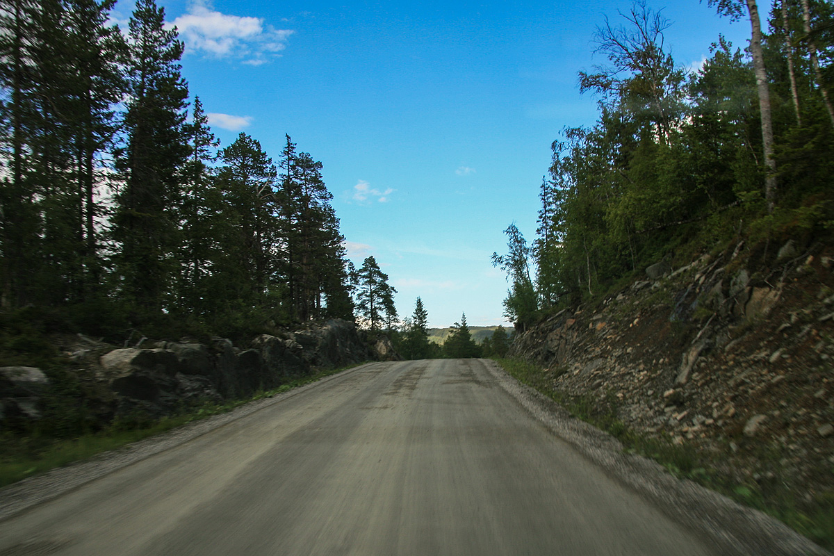 Parti fra Nord-Trøndelags fylkesveg 193 i Verran.